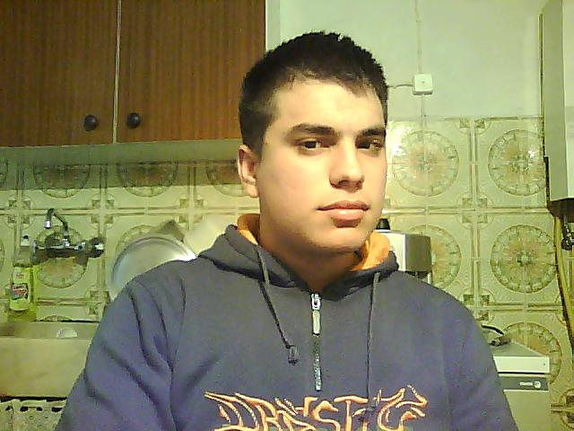 My photo